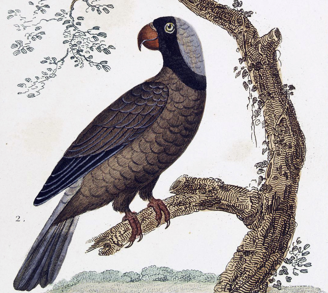 Mascarene Parrot Mascarinus mascarinus from L'Histoire Naturelle Des Oiseaux (1850).